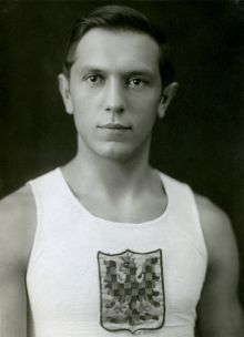 Jan Koreis (1907-1949), československý sportovec, atlet